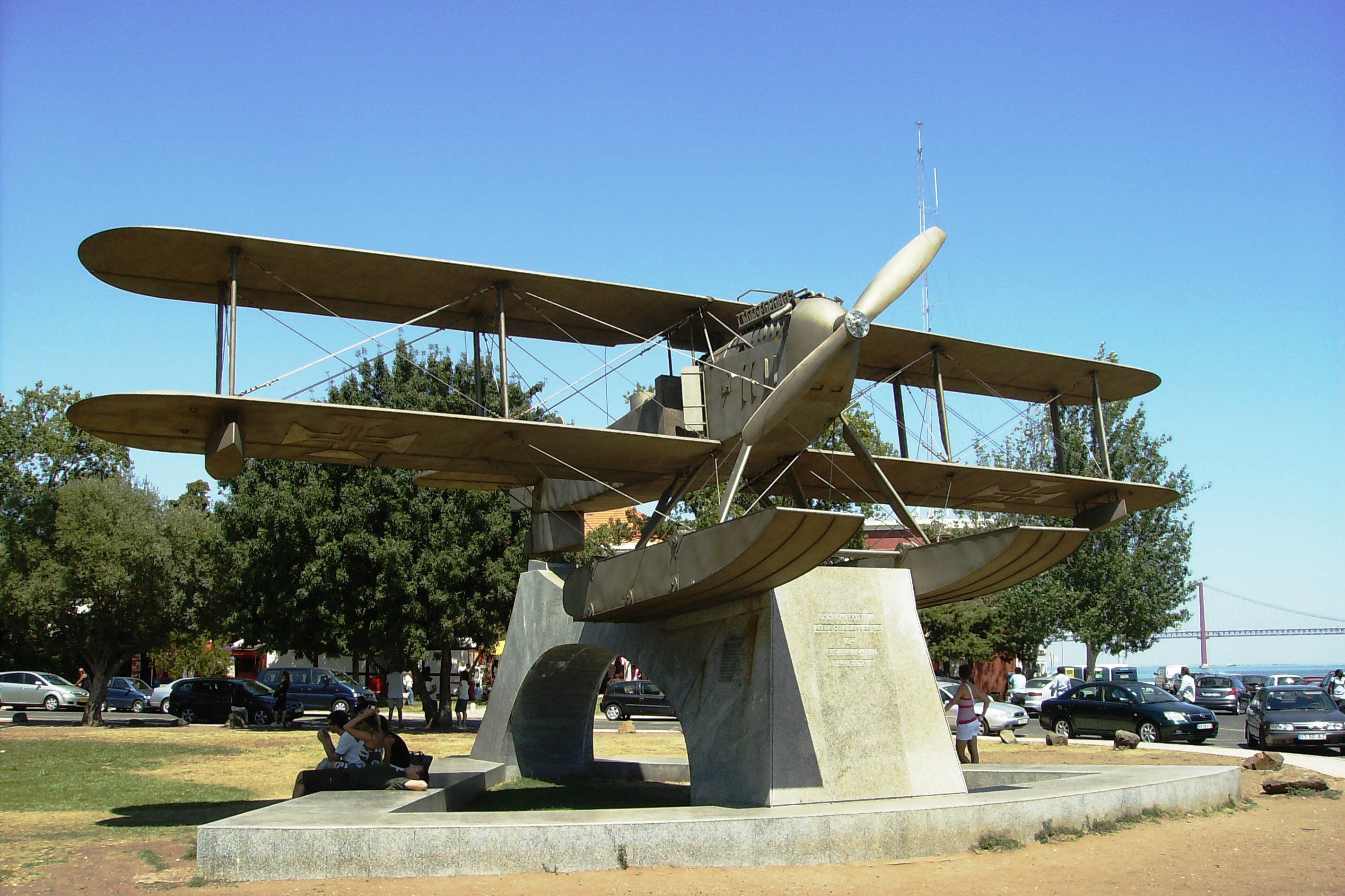 Réplica em aço do hidroavião Fairey III ("Santa Cruz"), que concluiu a primeira travessia aérea do Atlântico Sul (Junho de 1922). Santa Maria de Belém, Lisboa, Portugal.